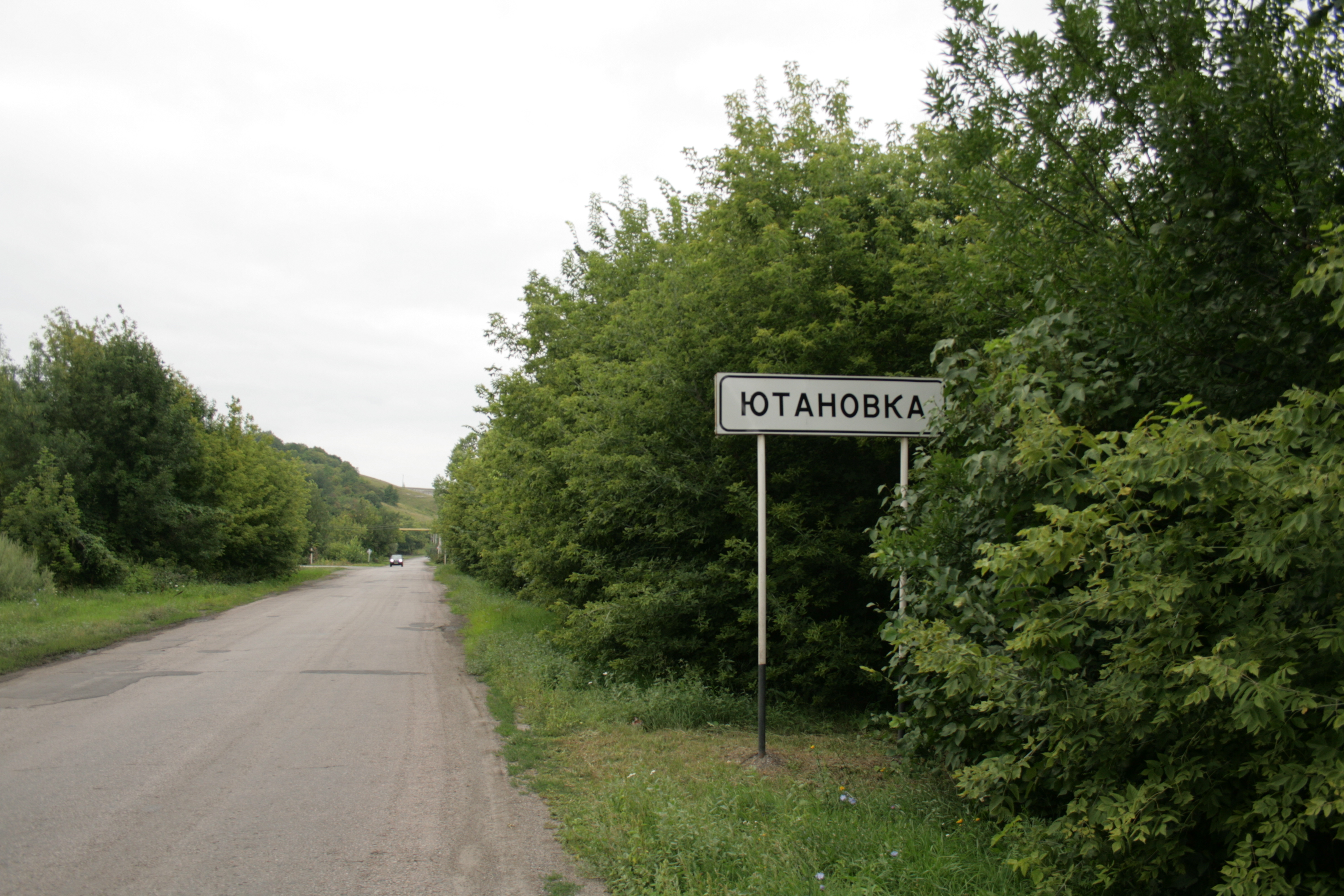 Ютановское городище.